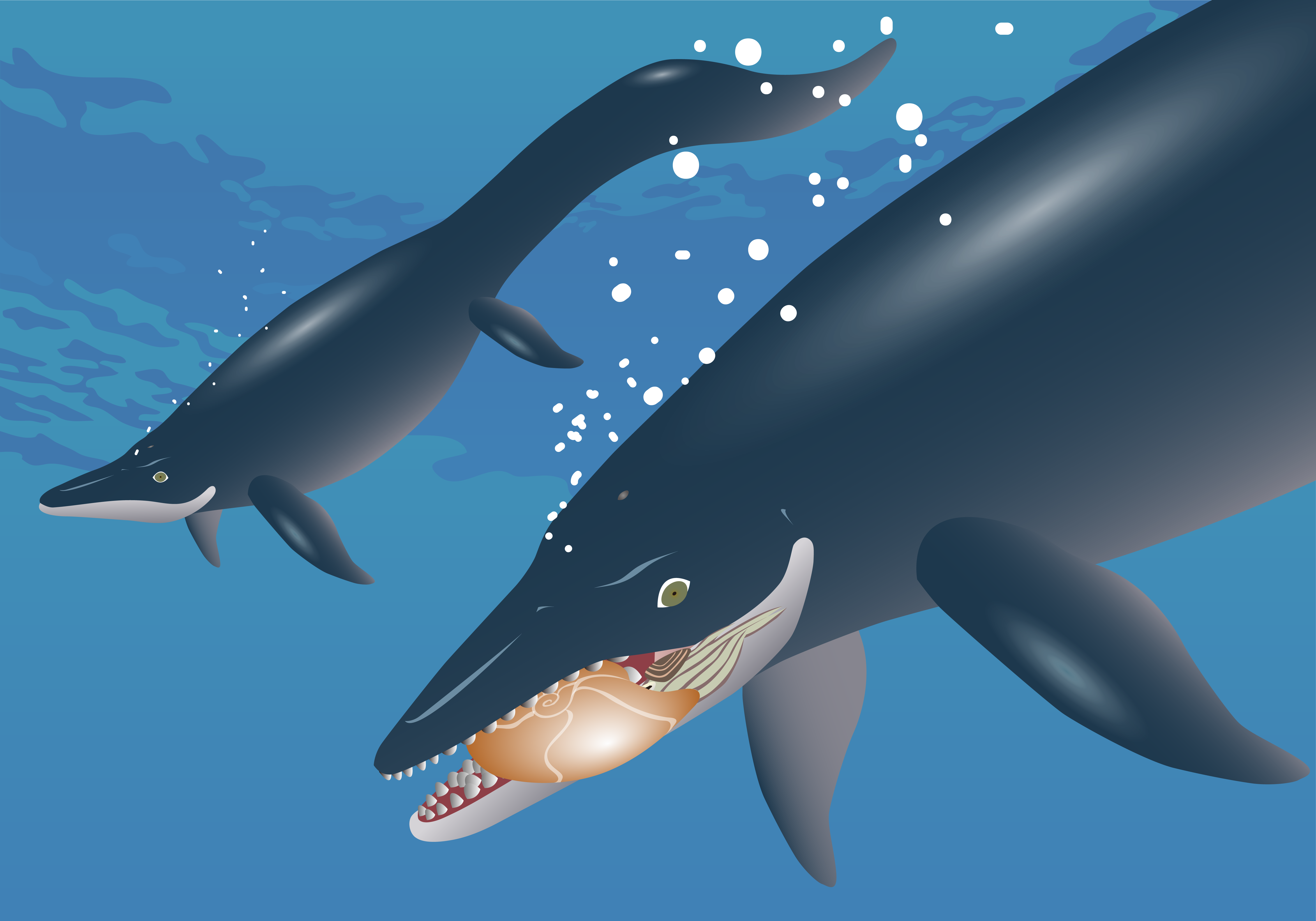 アンモナイトを捕食するオムファロサウルスの想像図